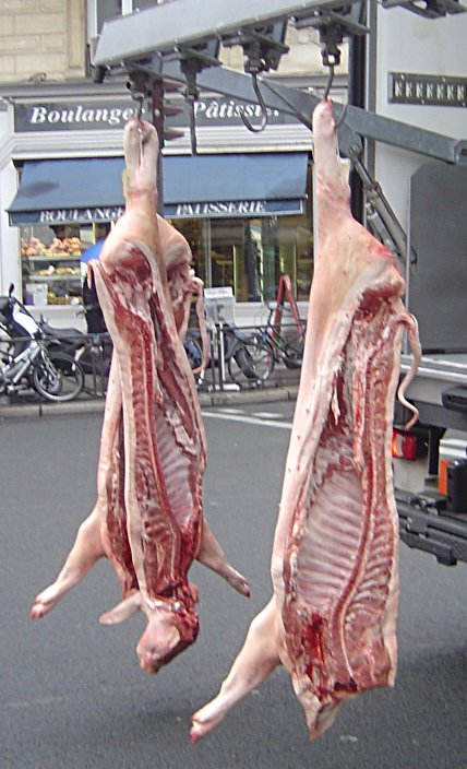 Pork being delivered, rue Claude Bernard, Paris, 2005-11-28